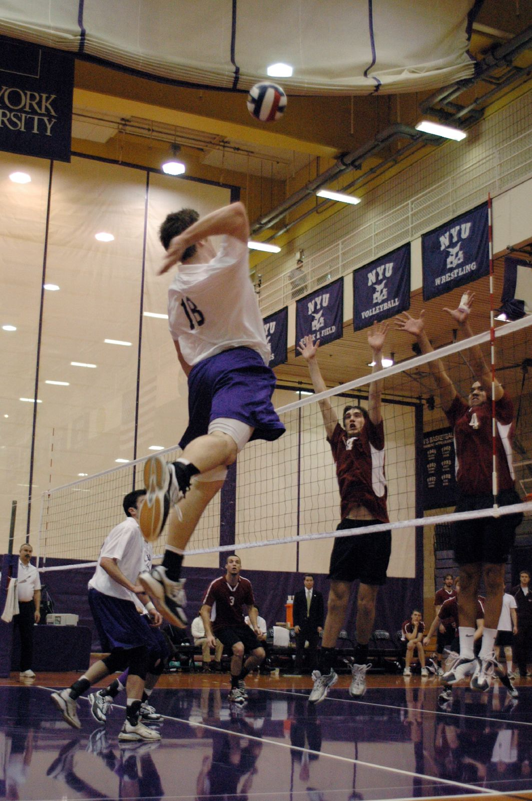 Volleyball